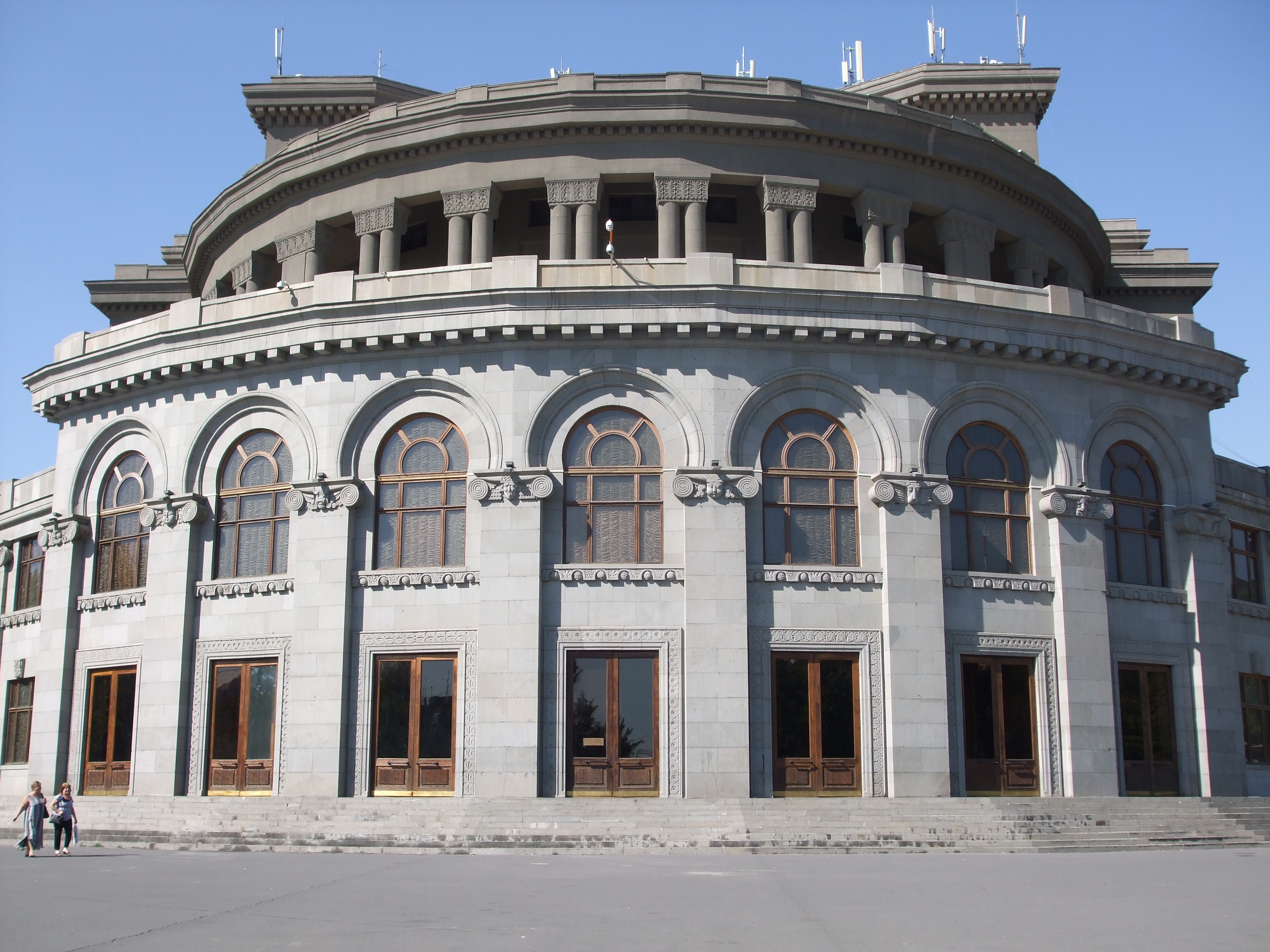 1940 թ., 1953 թ., Թումանյան փող. 36, 1937 թ. Մեծ մրցանակ Փարիզում, ճարտ.` Ա. Թամանյան, վրկռ`1981-1983 թթ., վրկռ. ճարտ.` Գ. Թամանյան, Յու. Թամանյան 6/95.2